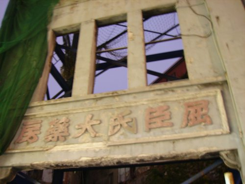 中文（台灣）: 臺北市大同區迪化街屈臣氏大藥房。